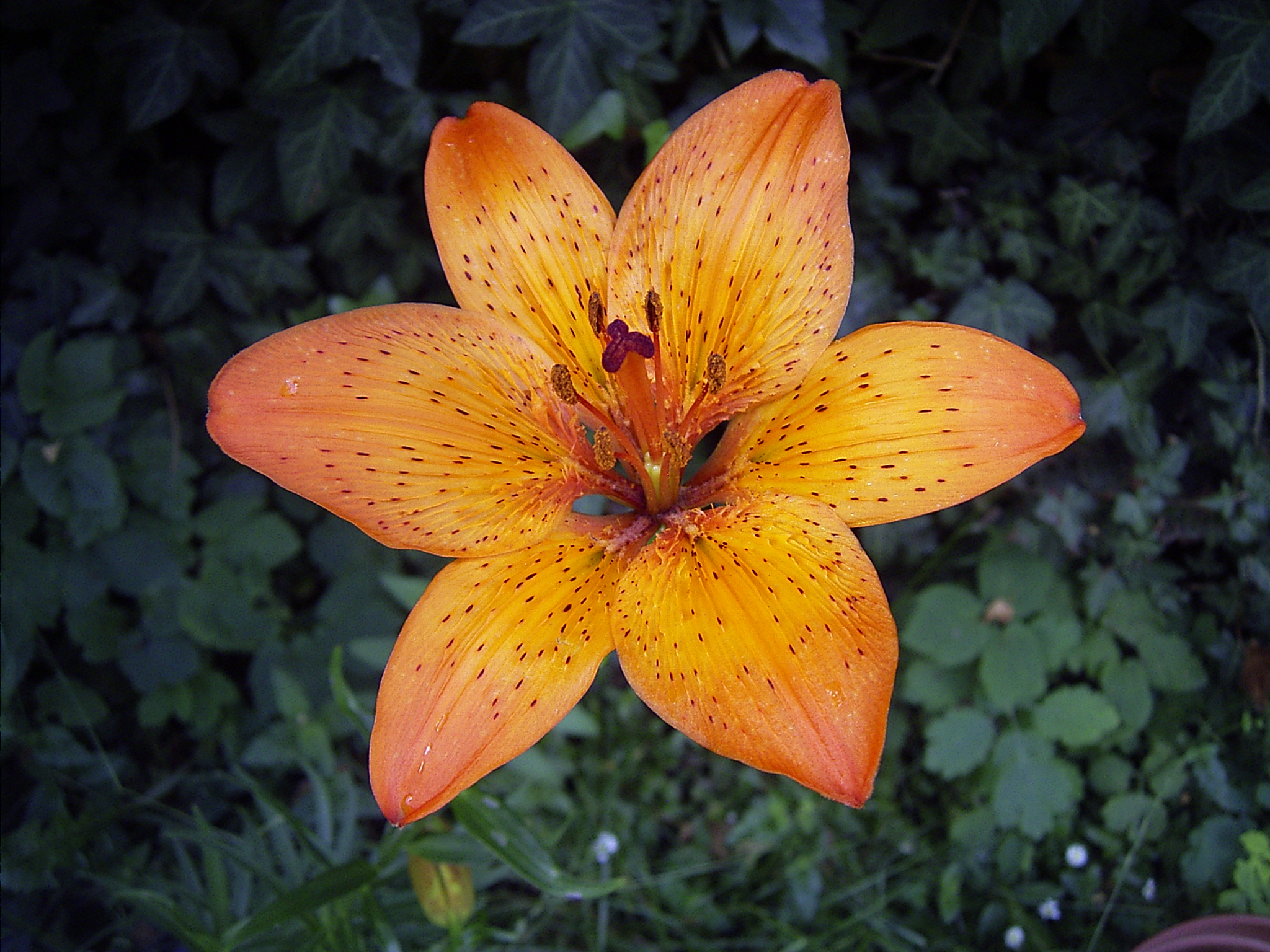 Flora Lilium bulbiferum ssp. croceum, ex coll. Monte Adone, Bologna, Italia